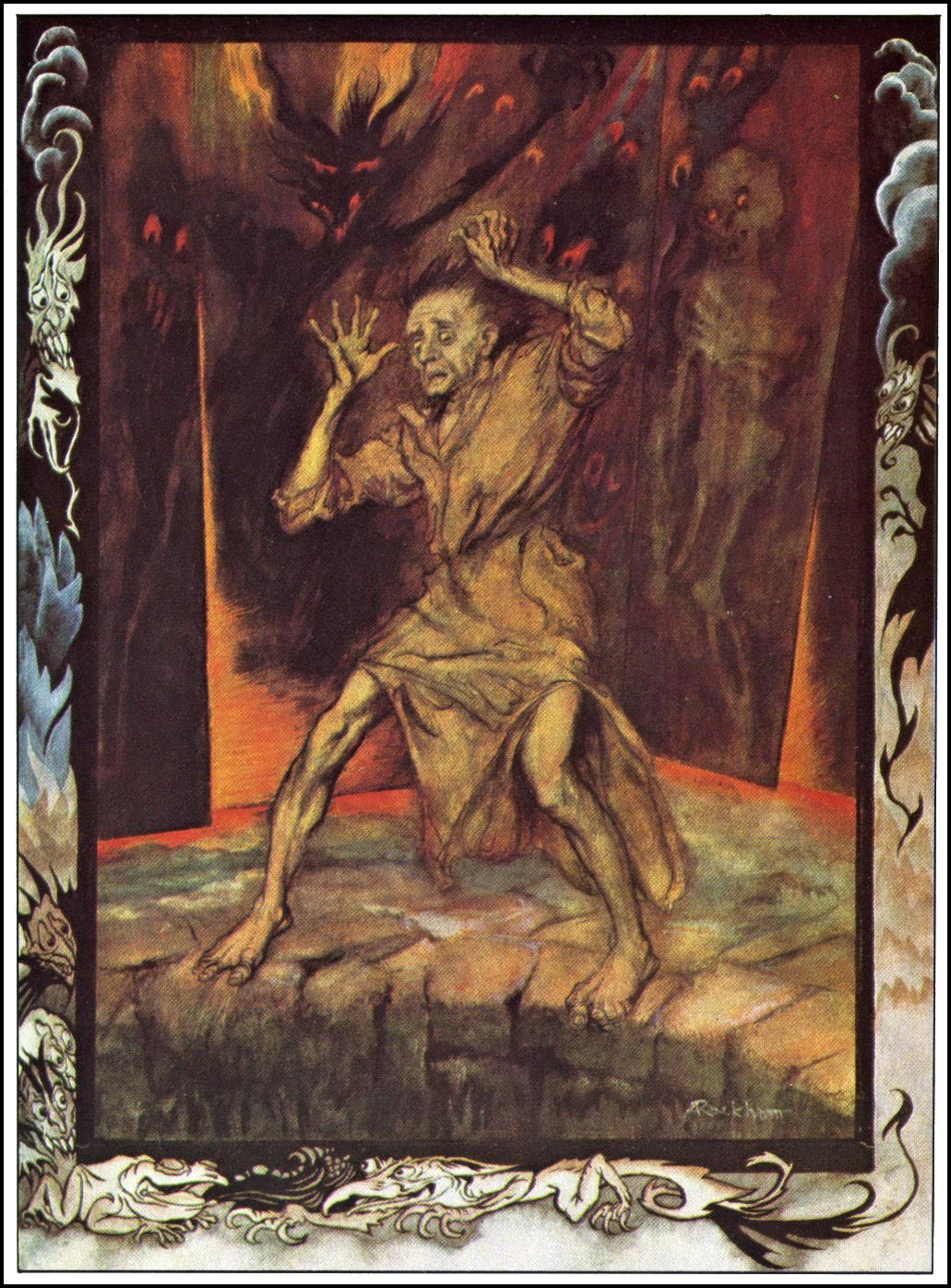 Иллюстрация Артура Рэкхема из книги "Poe's Tales of Mystery and Imagination" к рассказу Эдгара По "Колодец и маятник"